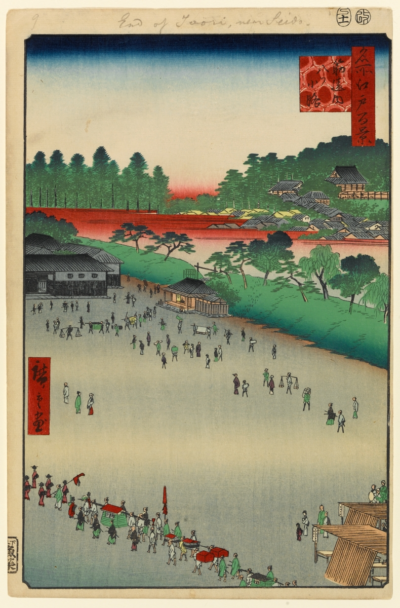 Part of the series One Hundred Famous Views of Edo, no. 009, part 1: Spring. "広重『名所江戸百景』より「筋違内八ツ小路」＝現在の交通博物館跡地～神田郵便局あたり。明暦大火ののち筋違橋門（すじかいばしもん; 画中では右に見切れている）に隣接して設けられた火除地であった。画面奥（霞で表現されている部分）は神田川。その手前には火除土手が見える。土手の切れ目は昌平橋。なお、それまで連雀町と呼ばれる町人地がここにあったのだが、住民は郊外（現在の三鷹市下連雀付近）に移され、その後新田開拓にあたっている。"— Japanese Wikipedia "火除地"